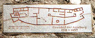 Grundriss der Asseburg